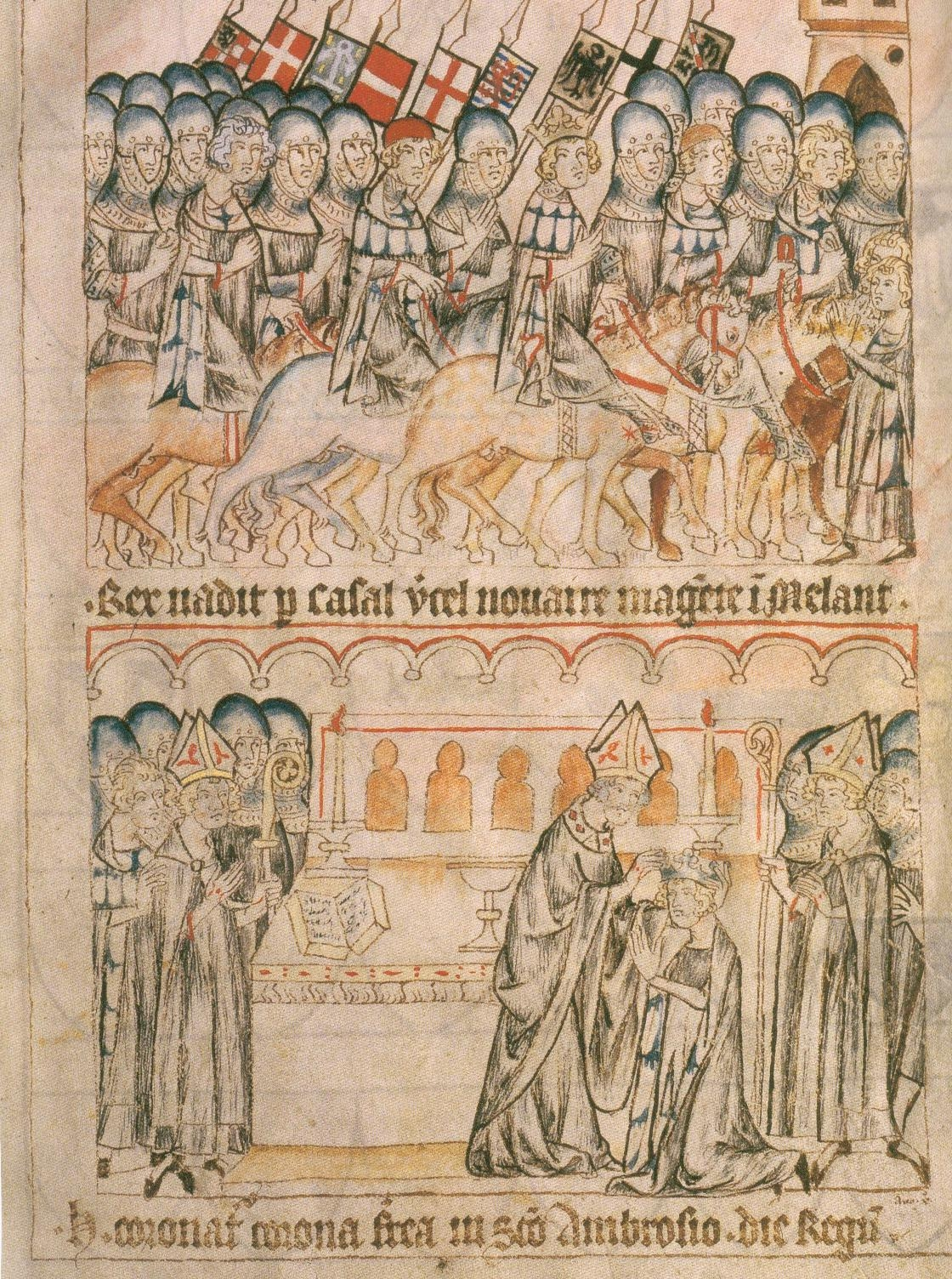 Codex Balduini Trevirensis: Einritt Kaiser Heinrichs VII. in Mailand, um 1340, Landeshauptarchiv Koblenz, Best. 1 C Nr. 1 fol. 9